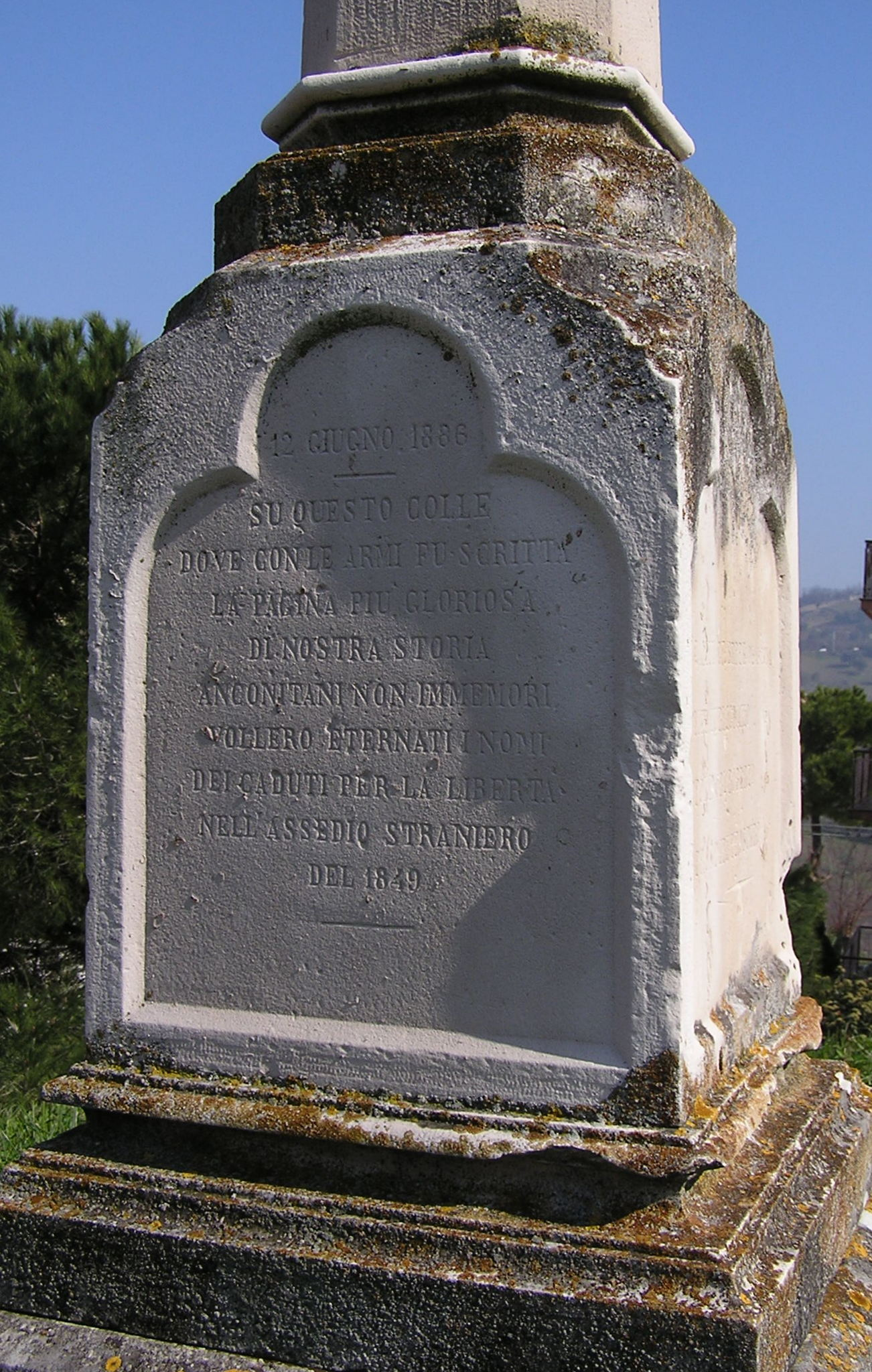 Monumento di Monte Marino ad Ancona, eretto in ricordo dell'assedio austriaco del 1849